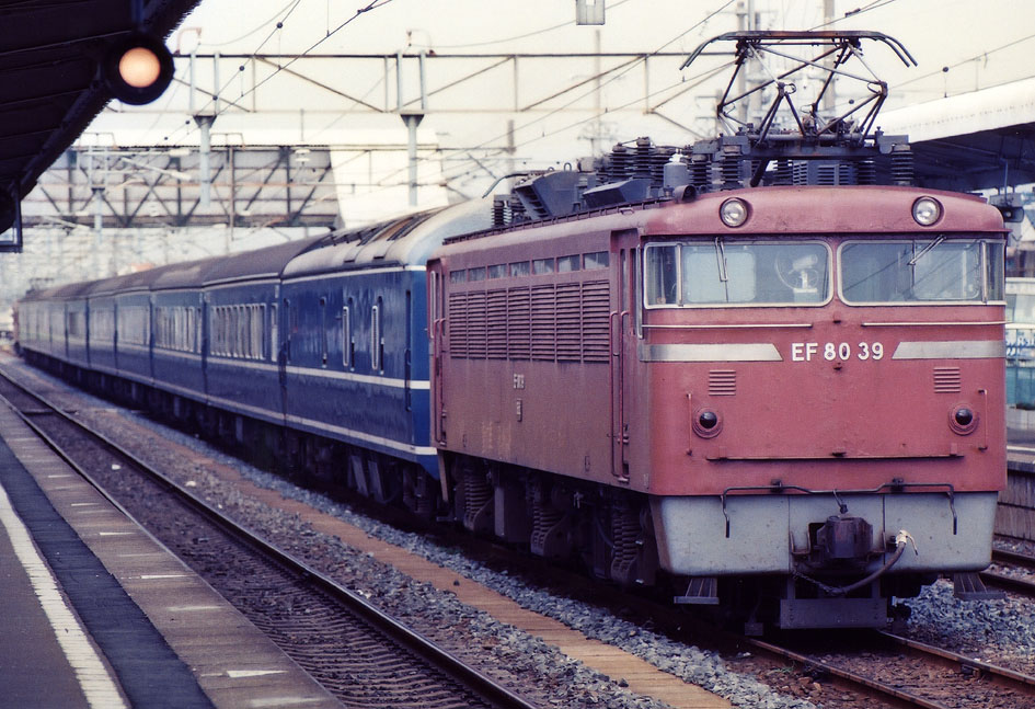 国鉄EF80 39+20系客車「エキスポドリーム号」（前はEF80 63）